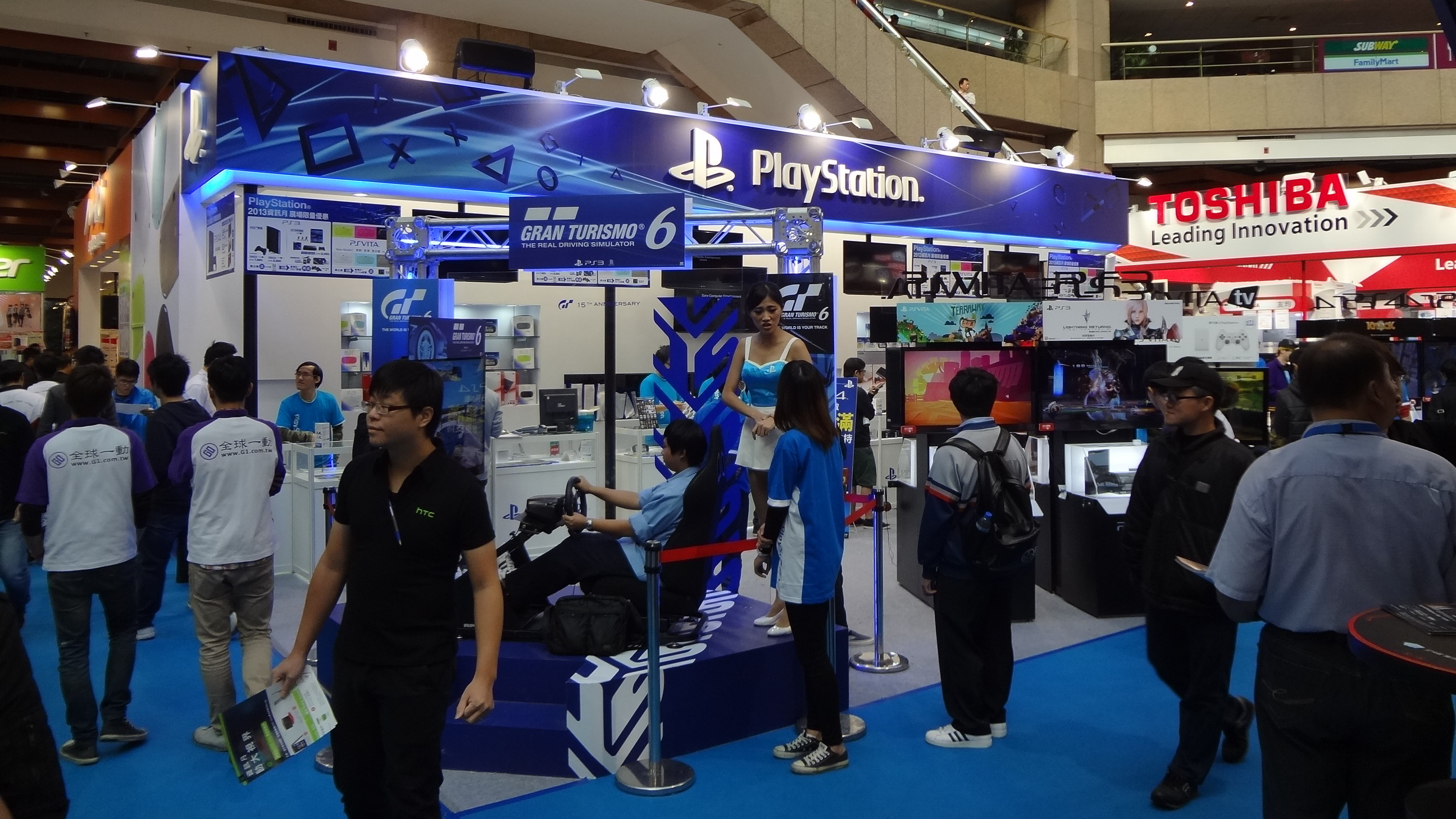 2013年資訊月的台灣索尼電腦娛樂攤位。